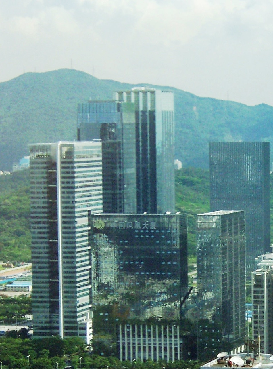 凤凰卫视总部——中国凤凰大厦